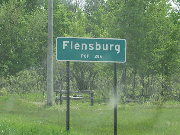 Flensburg, Minnesota. From